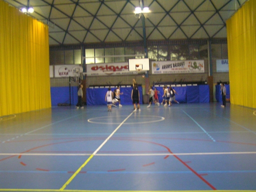 Fotografia de la pista central del pavelló municipal d'Arenys de Mar.